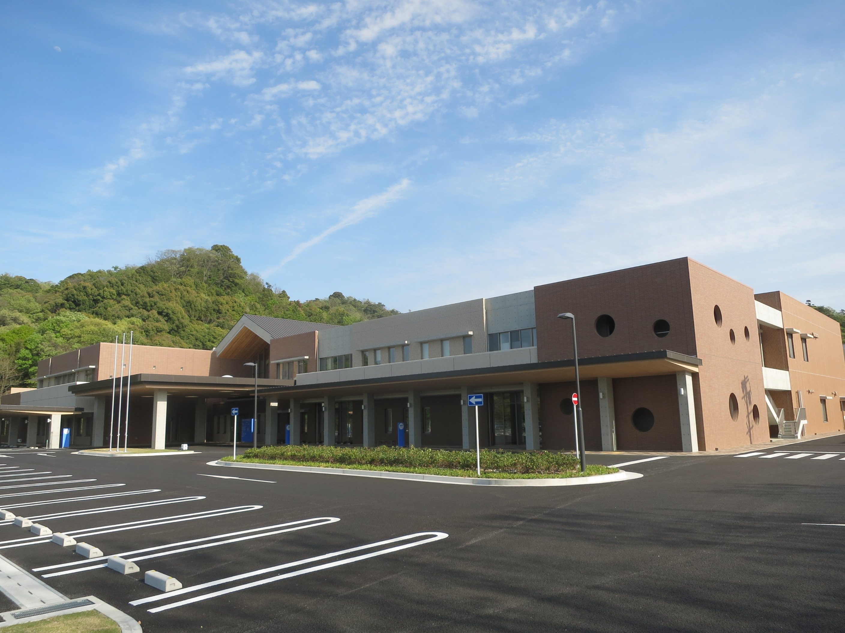 愛知県三河青い鳥医療療育センター（岡崎市高隆寺町）